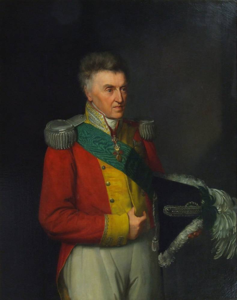 Anton von Sachsen (Anton der Gütige) (1755-1836), Bildausschnitt